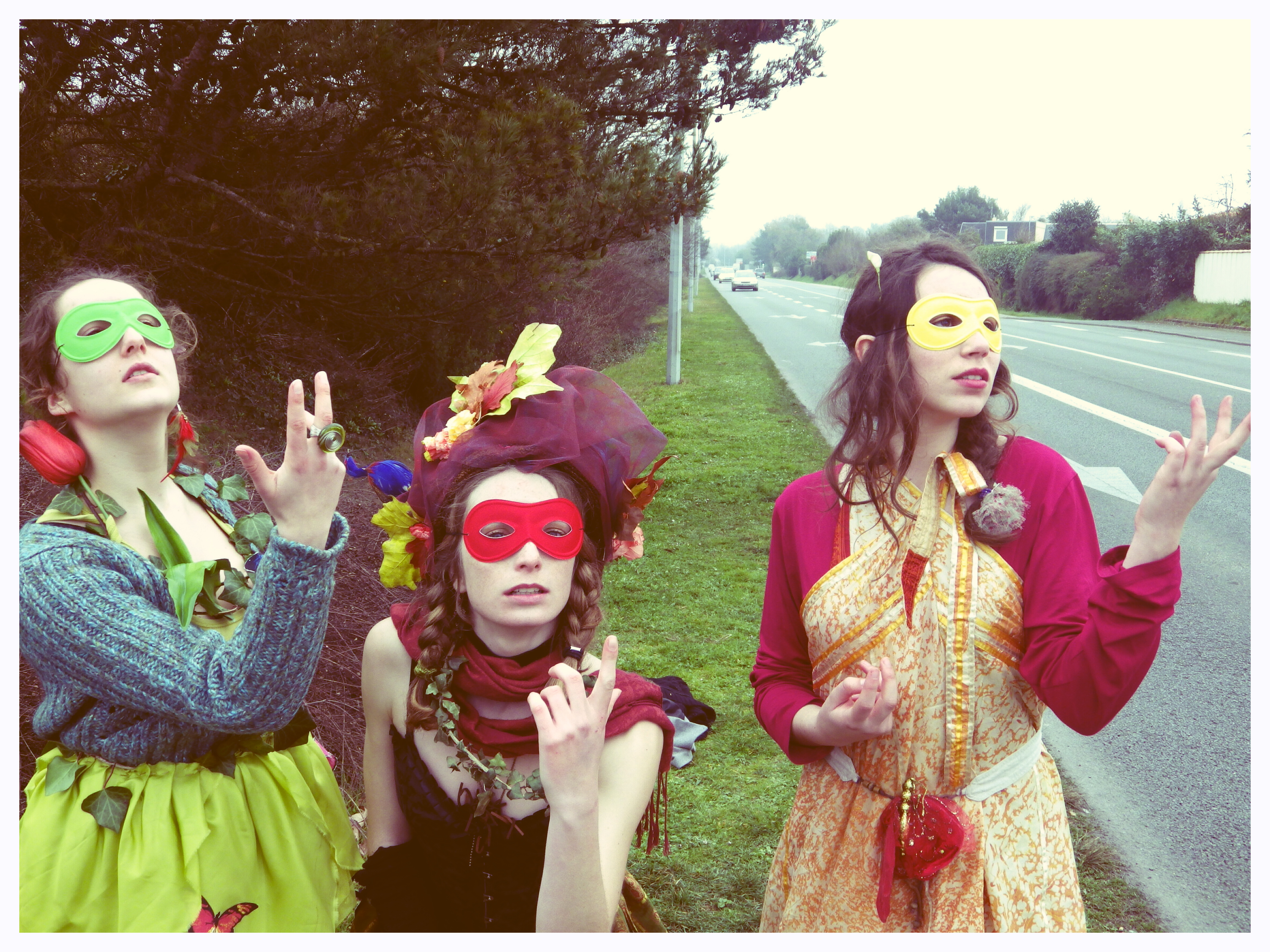 Percent de La Rochelle, 2015, des lycéennes déguisées en "Quatre Saisons" se tiennent près d'un feu tricolore pour demander de l'argent aux voitures qui s'arrêtent.